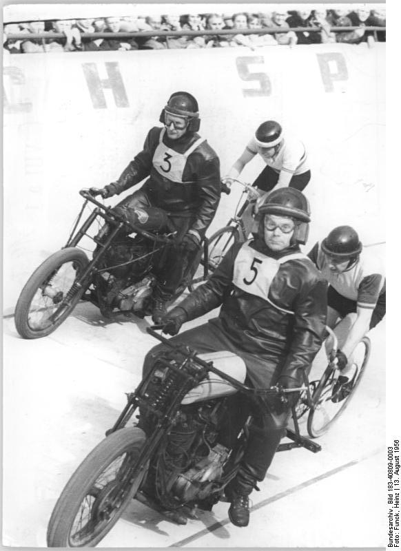 Barandat, Erich Stammer Zentralbild Funck 13.8.1956 Schur siegte in Weissensee Bei der am Montag, dem 13.8.1956, stattfindenden Großveranstaltung der Bahnfahrer der DDR siegte im Verfolgungsrennen über 4000 m der Verdiente Meister des Sports Gustav-Adolf Schur über seinen Klubkammeraden Erich Hagen. UBz: Die Fahrer Barandat (3) und Stammer (5) während des Dauerrennens.